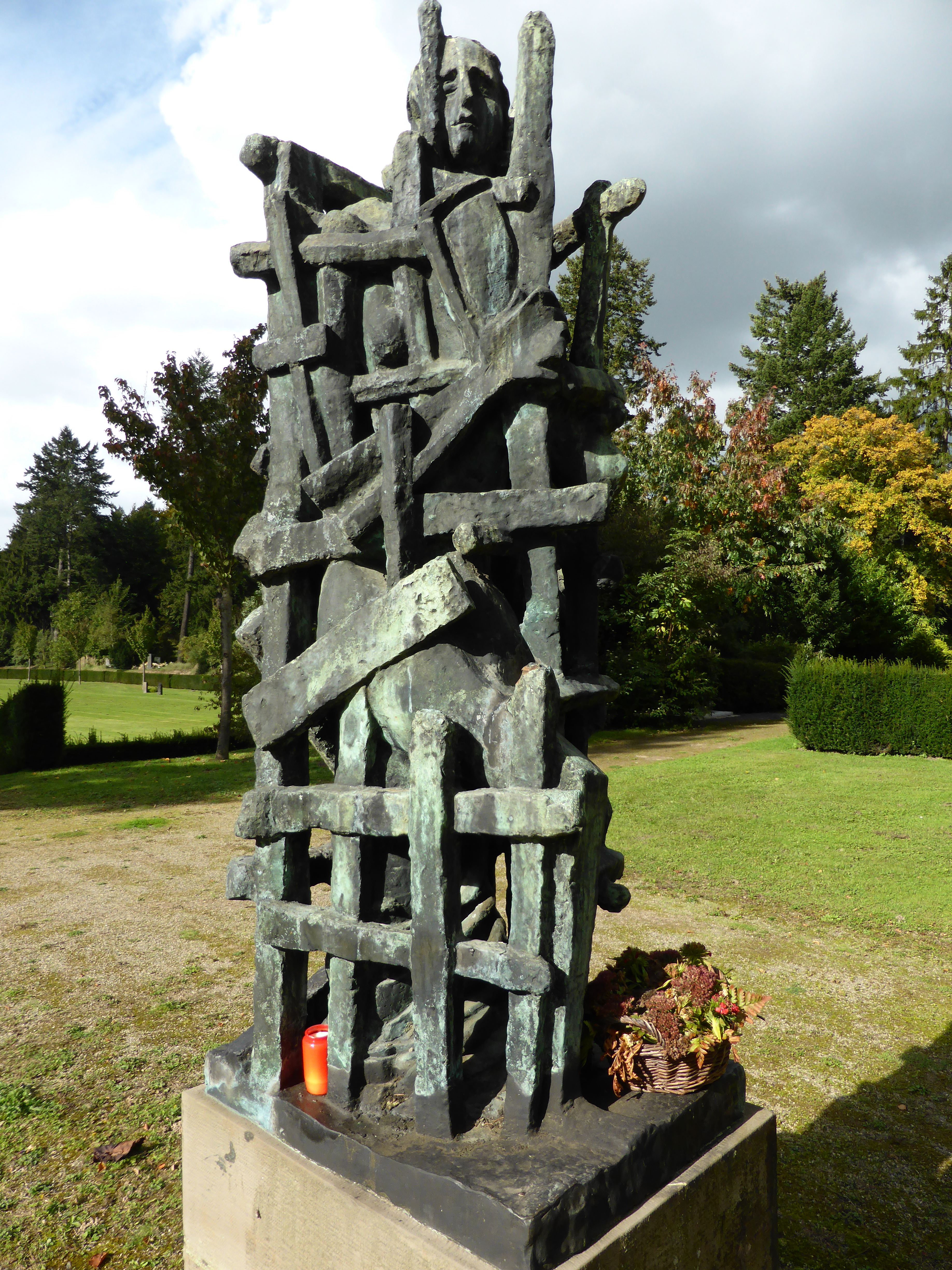 Ossip Zadkine Skulptur (Bronze) von 1943. Abguss von 1958 auf dem Westfriedhof (Köln). Inschrift: "cire perdue – dik grosman – velp Holland".